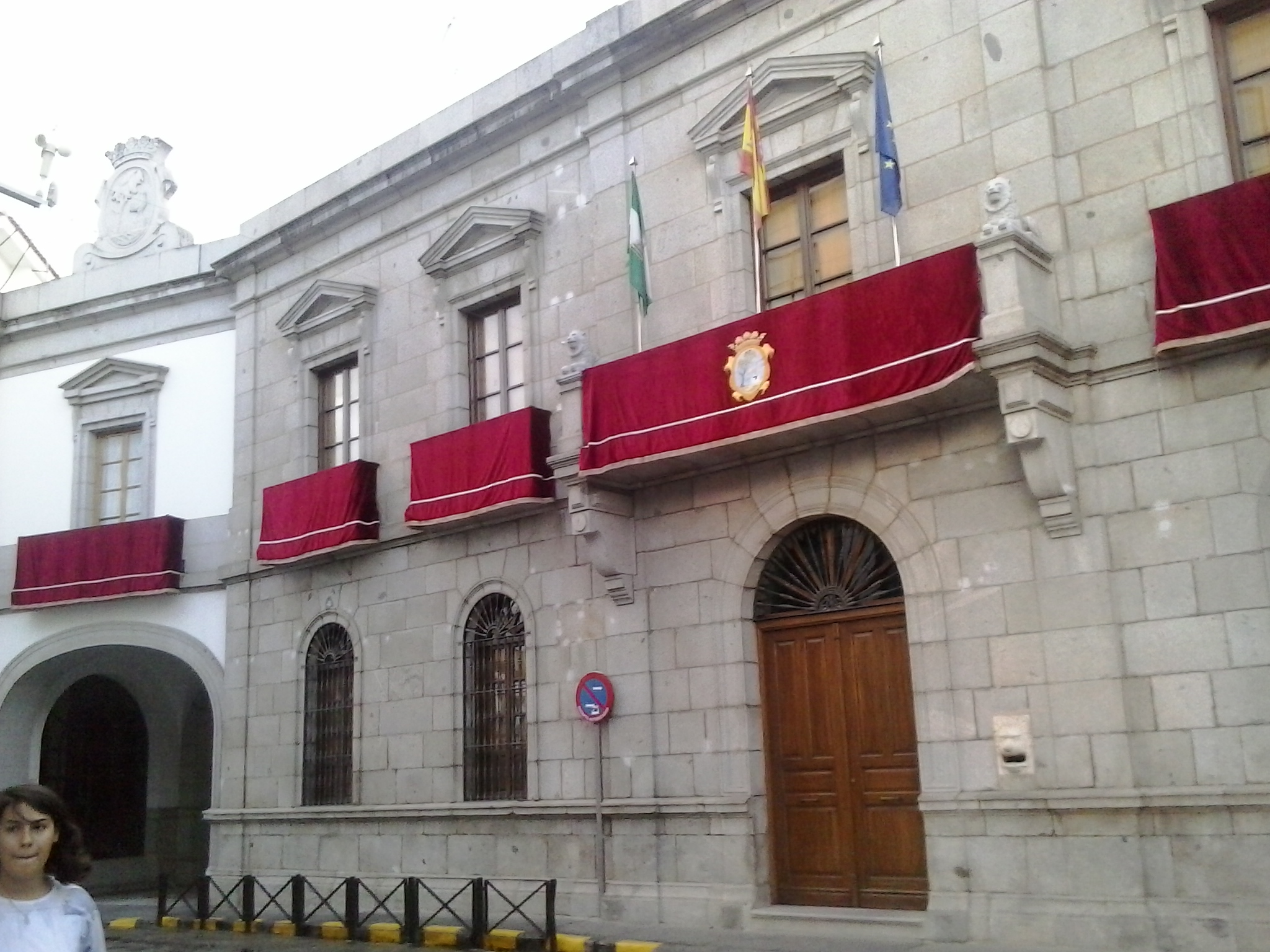 Ayuntamiento de Pozoblanco. Septiembre 2014